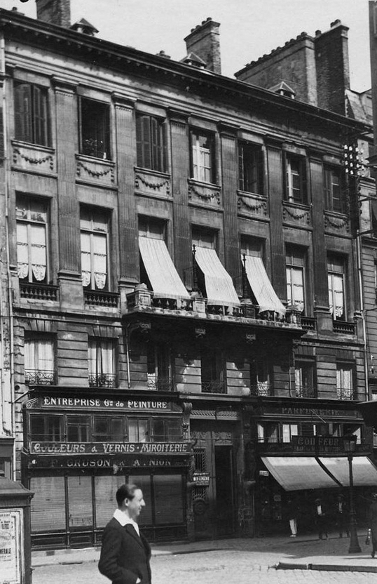 Ancien hôtel Homberg, dit Saint-Louis (Le Havre), 19 rue Faidherbe